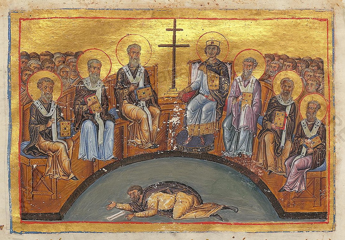 VII Вселенский Собор. Миниатюра из Минология Василия II. 976–1025 гг. (Vat. gr. 1613. Fol. 108) // Second Council of Nicaea